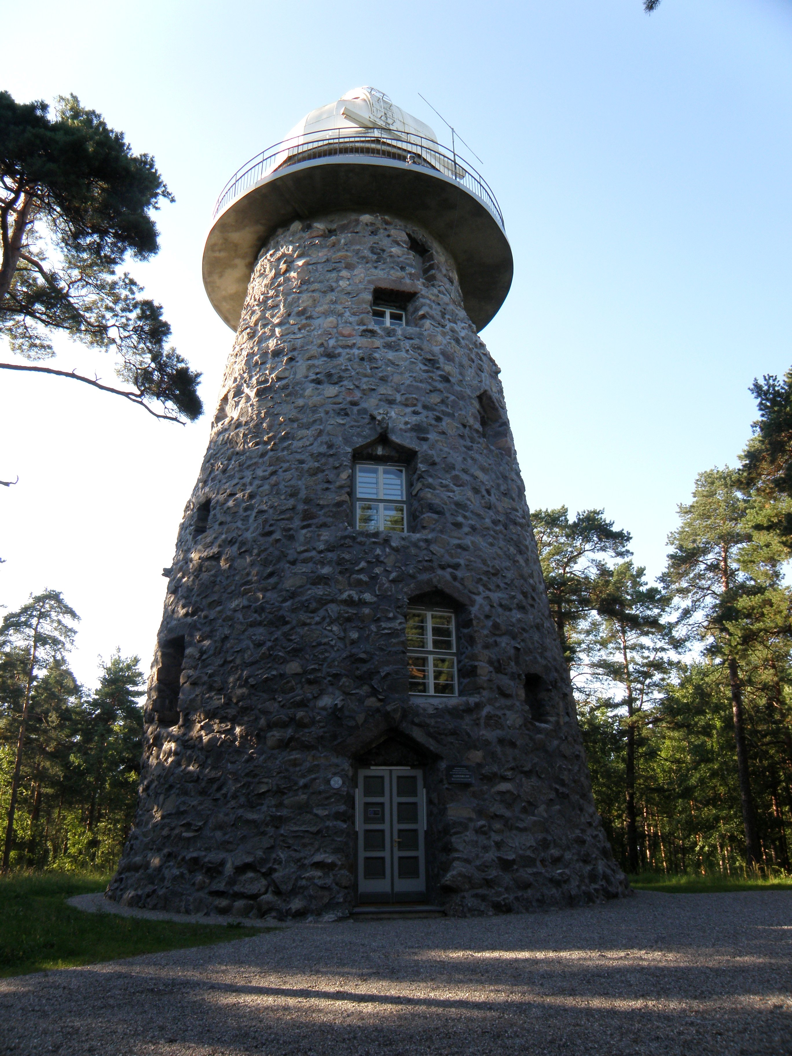 Glehni vaatetorn